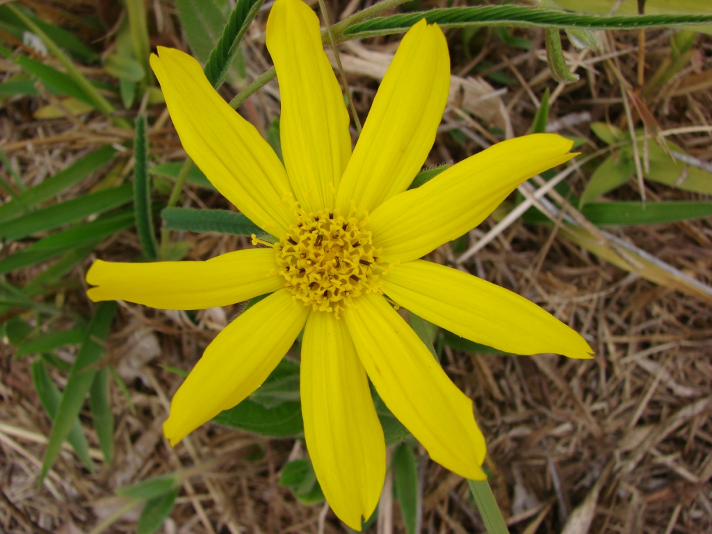 Aspilia foliacea - ASTERACEAE Parque Olhos d' água - Brasília - Distrito Federal - Brasil.